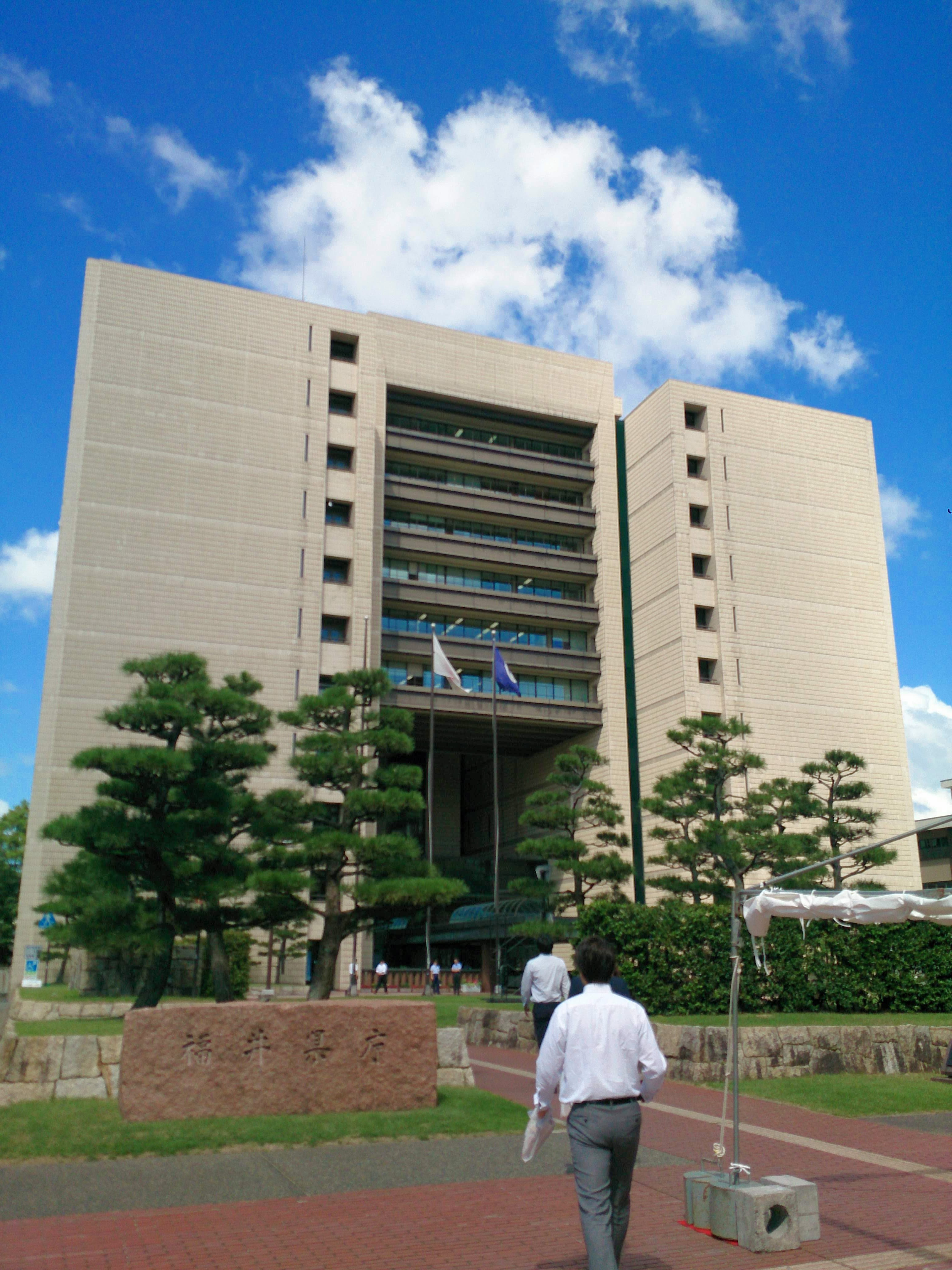 福井県庁の外観